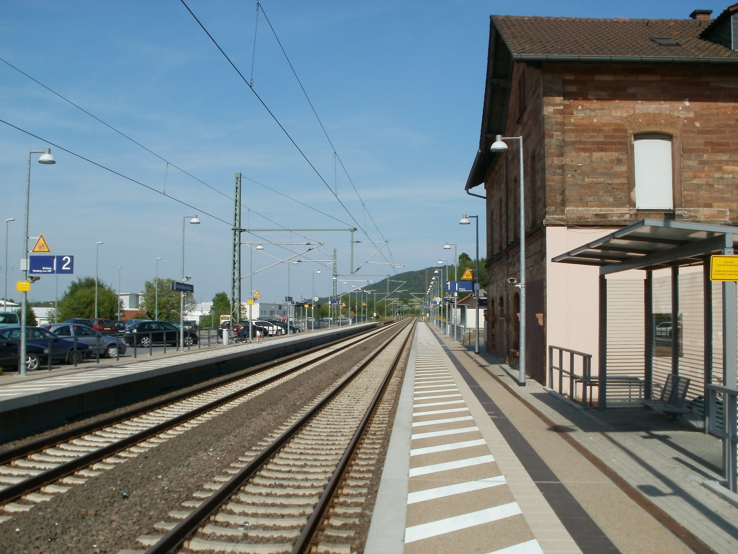 Bahnhof Bruchmühlbach-Miesau